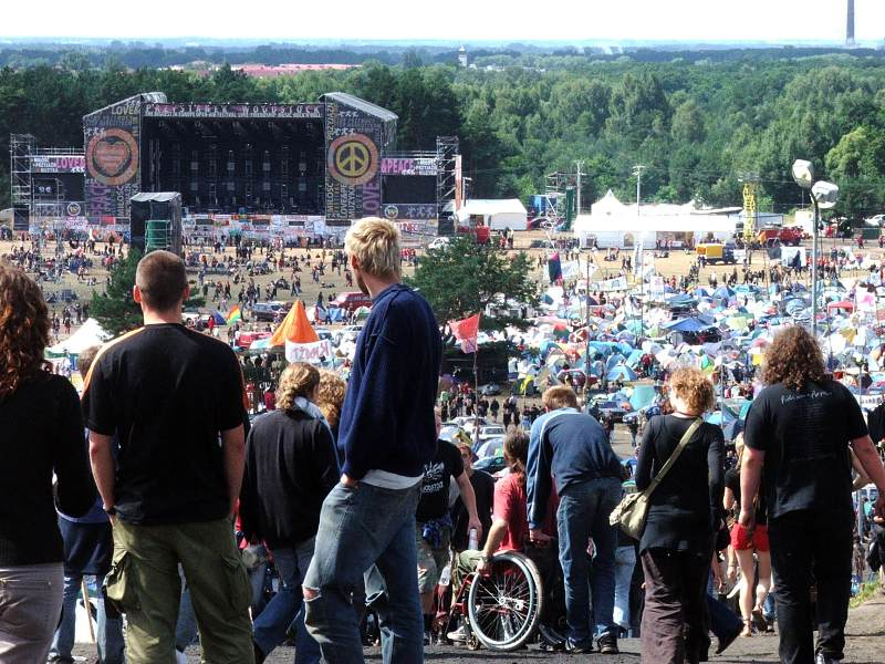 Przystanek Woodstock - Kostrzyn 2005